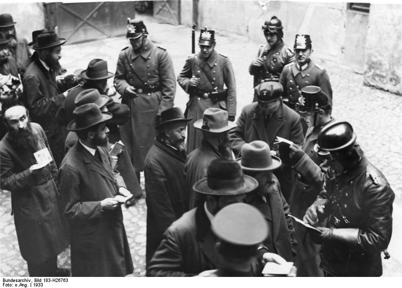 Berlin, Razzia im Scheunenviertel ADN-Zentralbild /Archiv Gross-Razzia der Polizeiabteilung in Berlin, Grenadier- und Dragonerstr. (1933) Eine jüdische Bewohnerschaft eines Hauses in der Grenadierstrasse wird auf dem Hof zur Durchsuchung nach Waffen und Prüfung der Papiere versammelt.